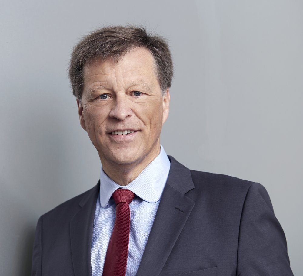 Johannes von Thadden